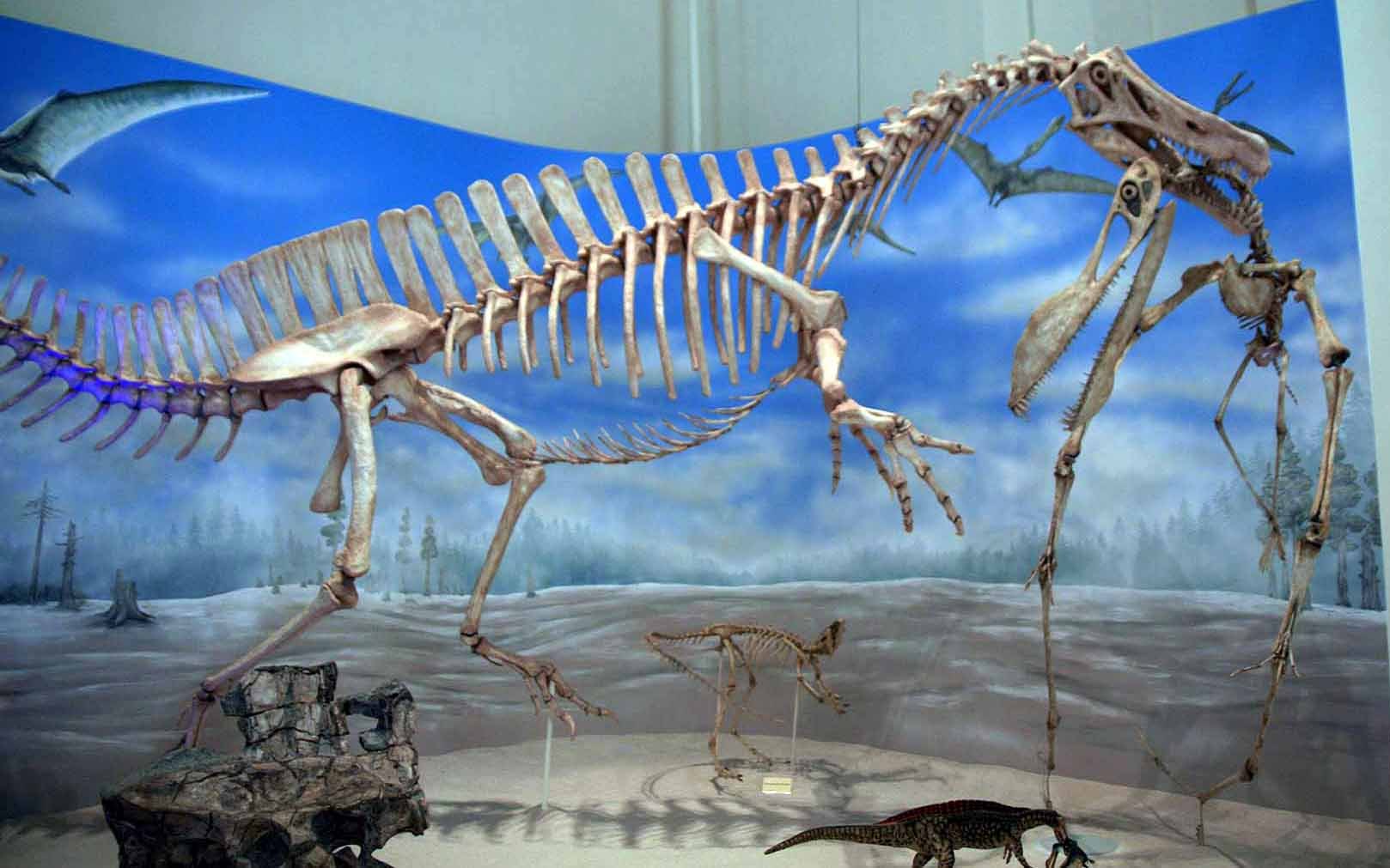 Museu Nacional da Universidade Federal do Rio de Janeiro, na Quinta da Boa Vista, Rio de Janeiro, Brasil.